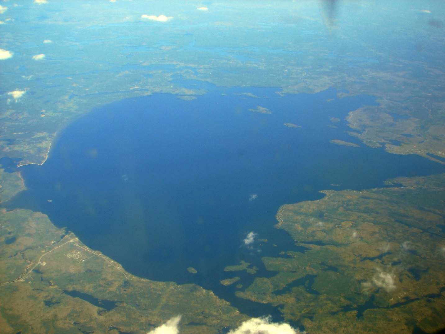 Lake Wanapitei, Sudbury, Ontario, Canada